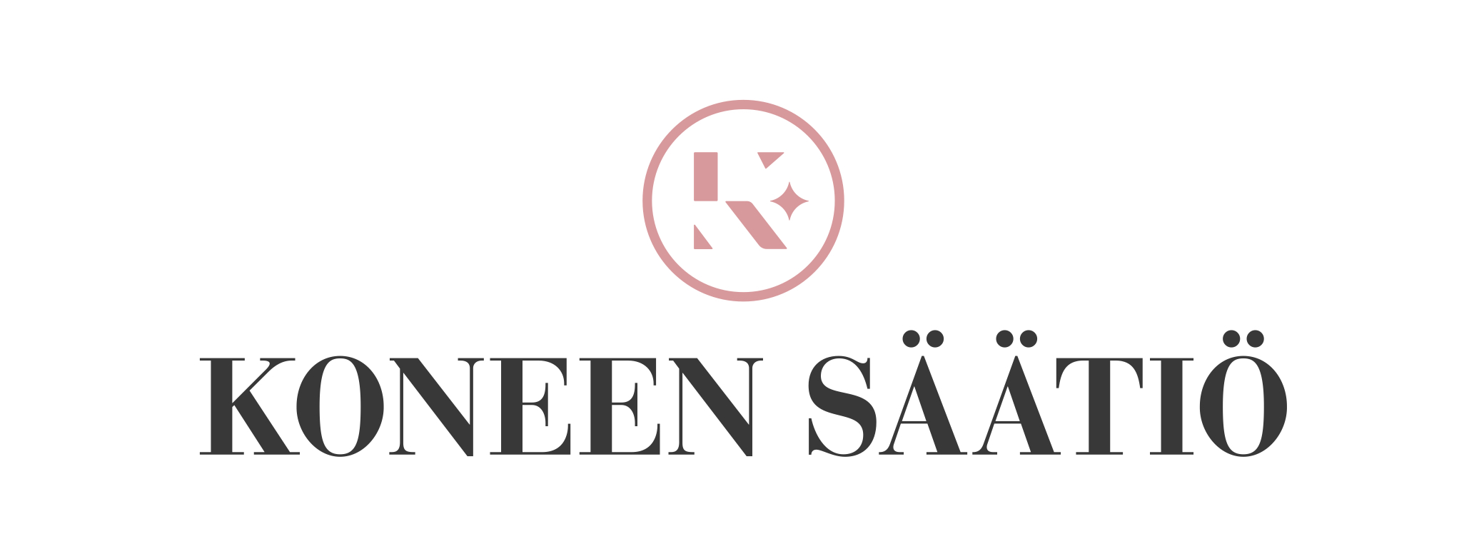 Koneen Säätiön logo